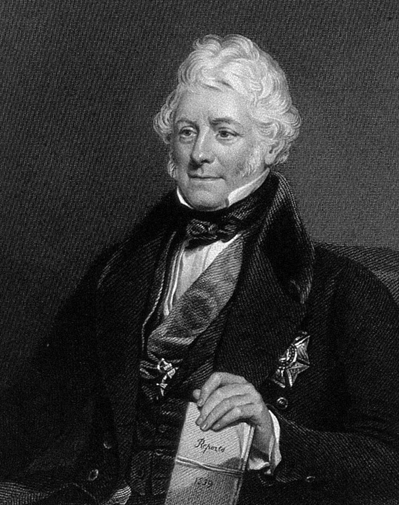 James McGrigor